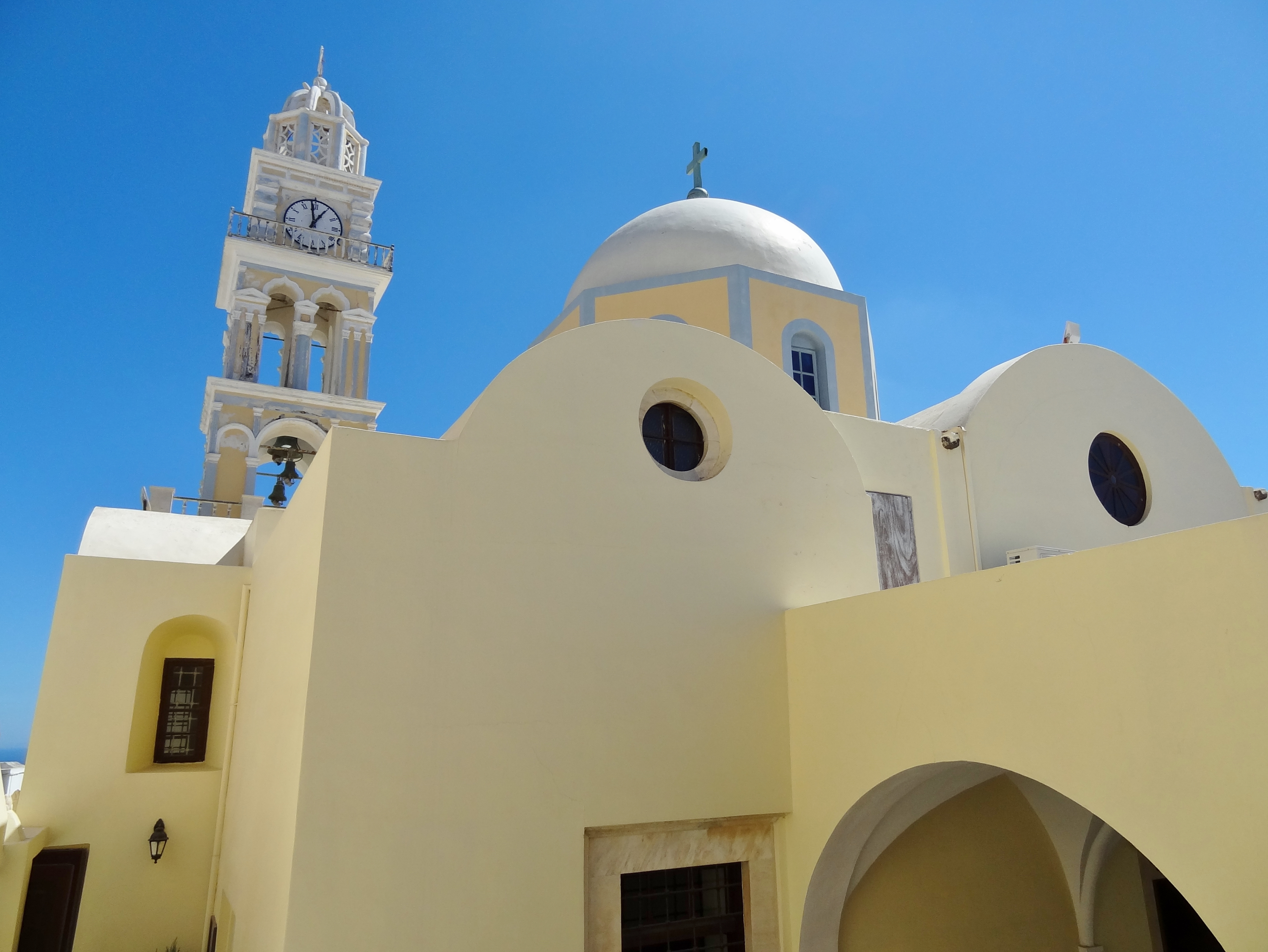 Katholische Kathedrale Johannes der Täufer in Fira auf Santorin, Kykladen, Griechenland